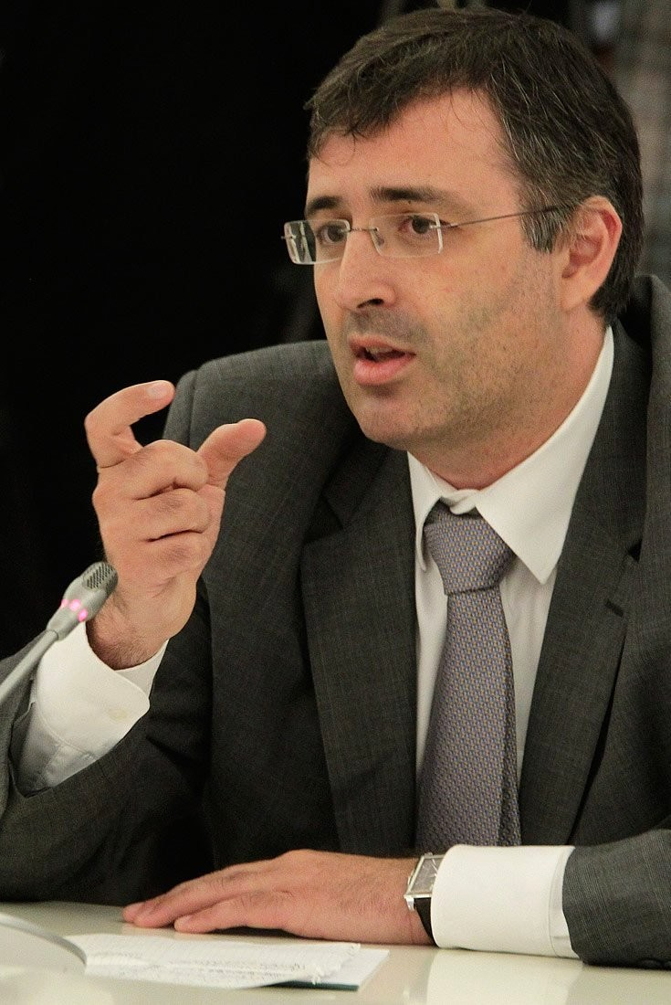 фото Сергей Маратович Гуриев